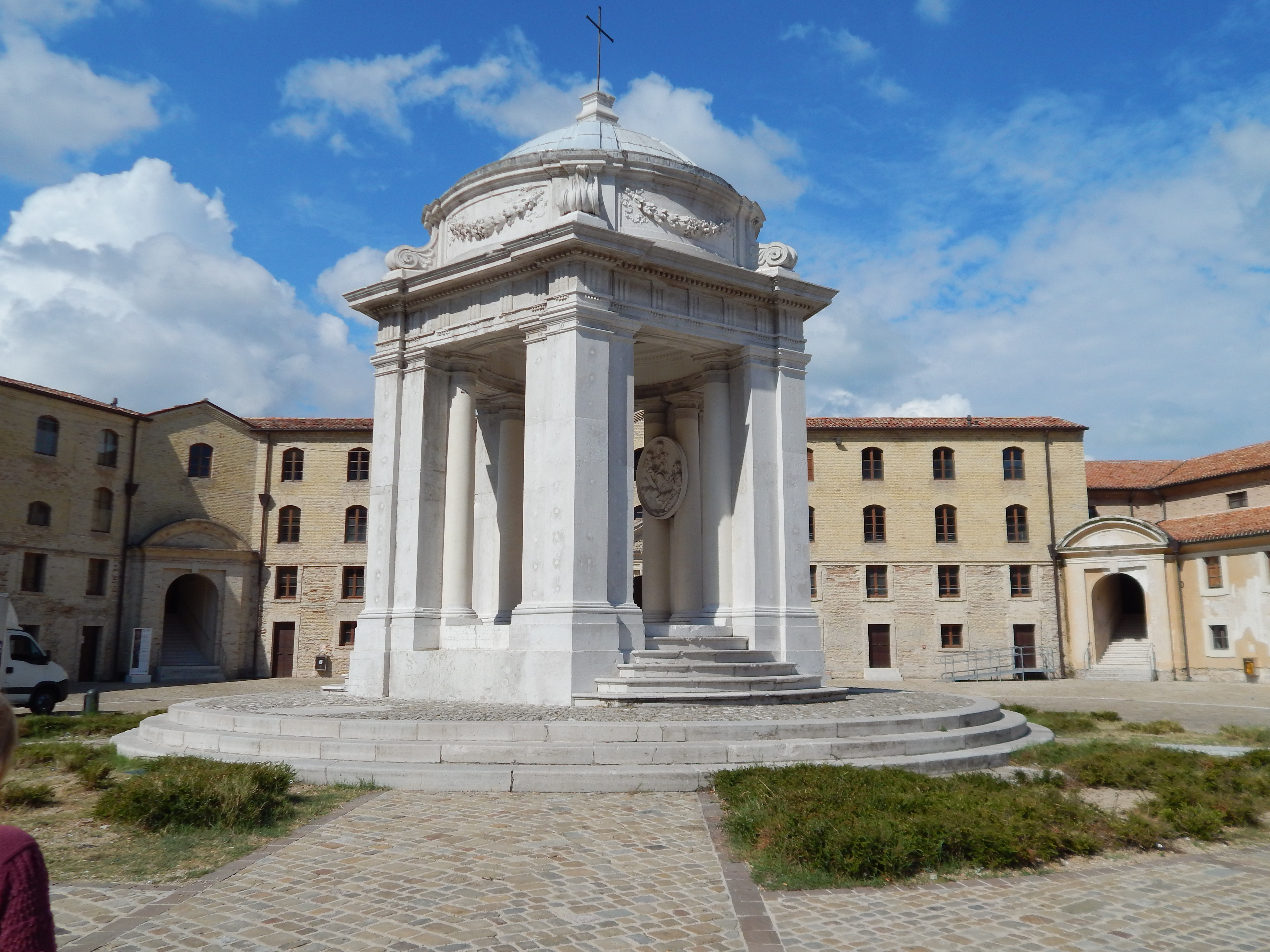 Mole Vanvitelliana This is a photo of a monument which is part of cultural heritage of Italy.